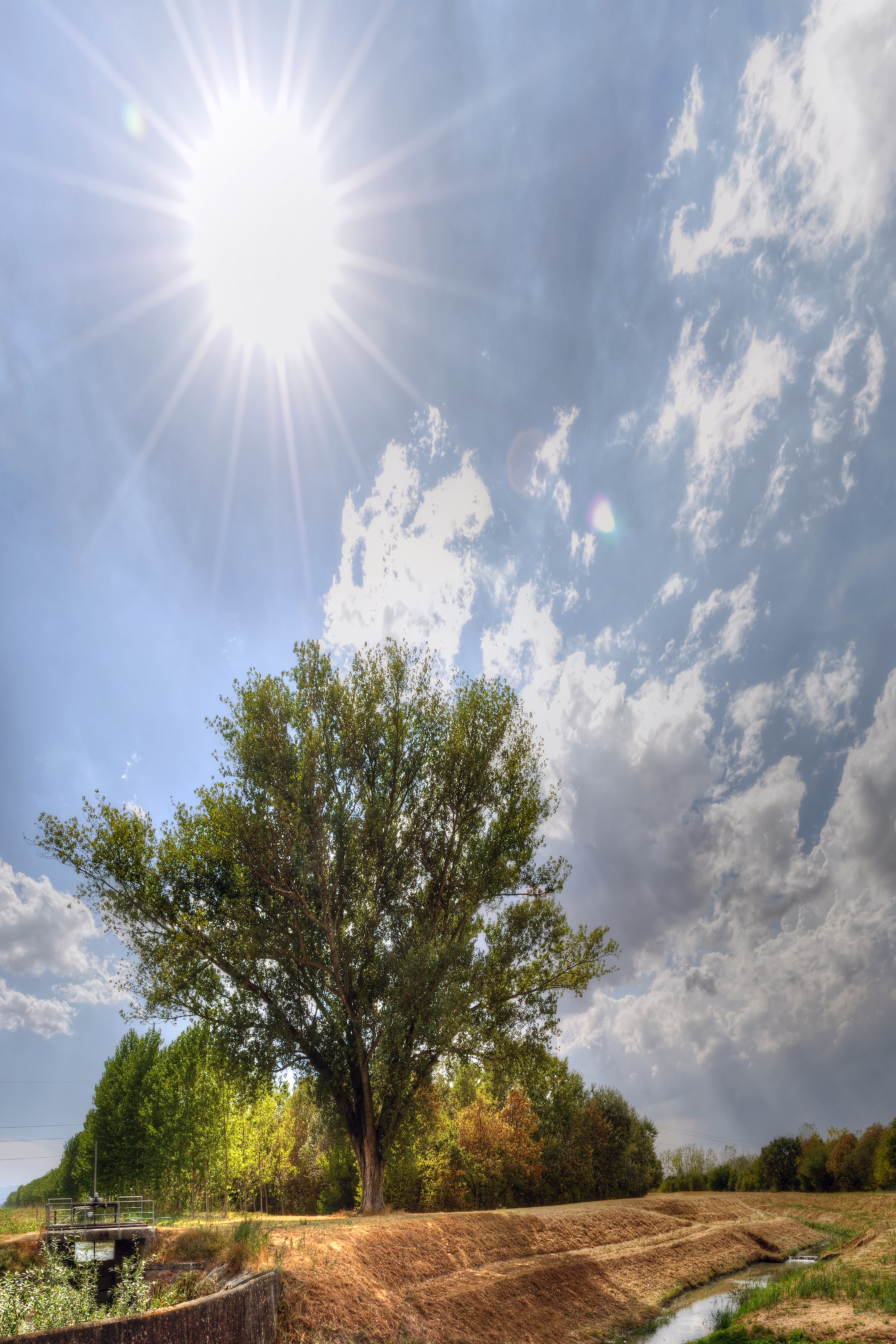 Canale Zena (?) - Crevalcore, Bologna, Italia - 31 Agosto 2012